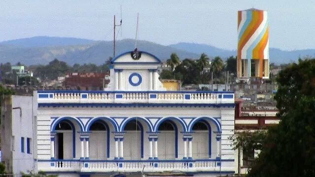 Vista parcial de la ciudad de Palma Soriano ,en 1era plana el Poder Popular y al fondo Tanque del Acueducto